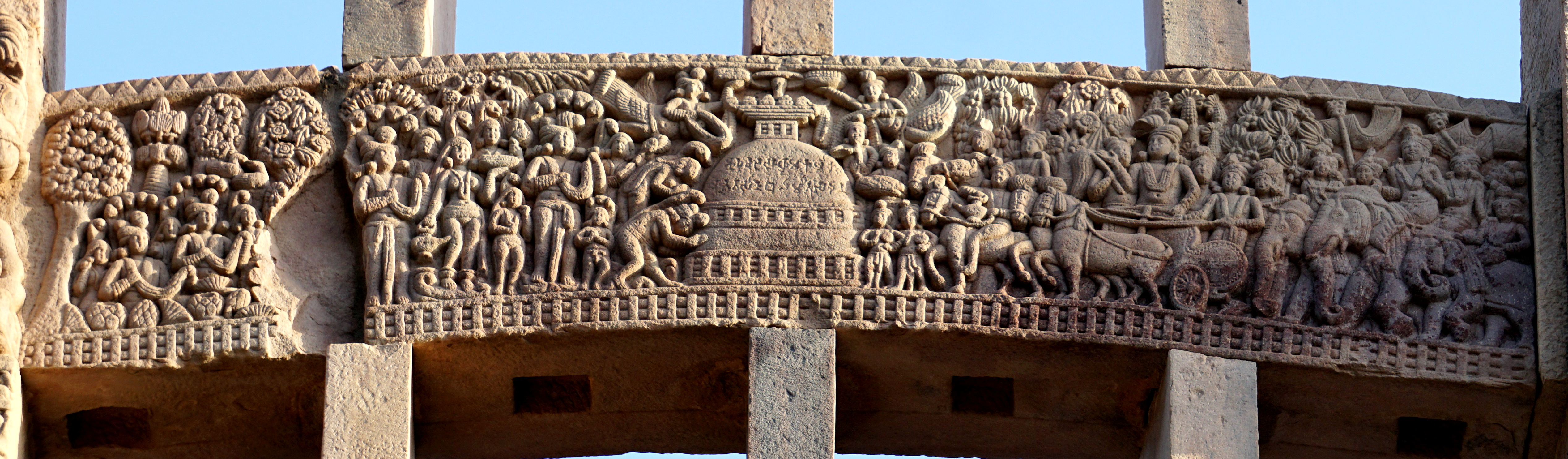 Sanchi Stupas, Vidisha, India